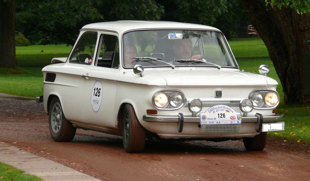 NSU Prinz TT